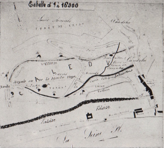 dessin de l'auteur